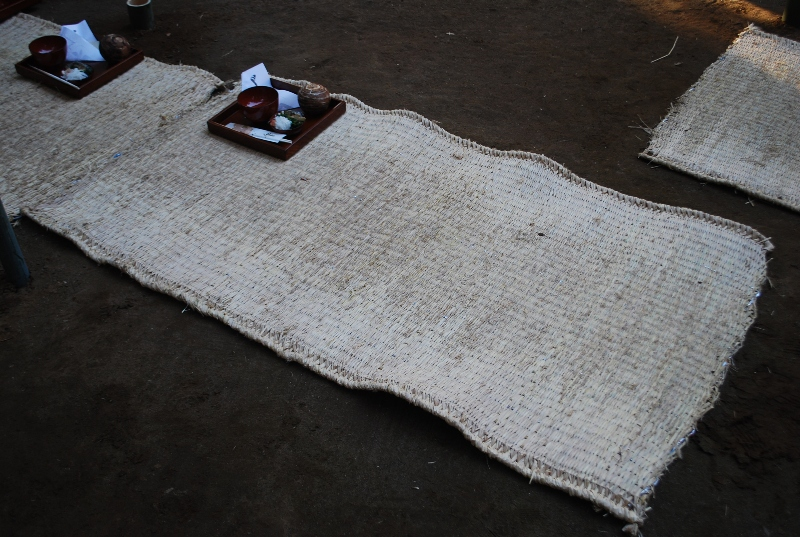 筵（むしろ）。香取市。